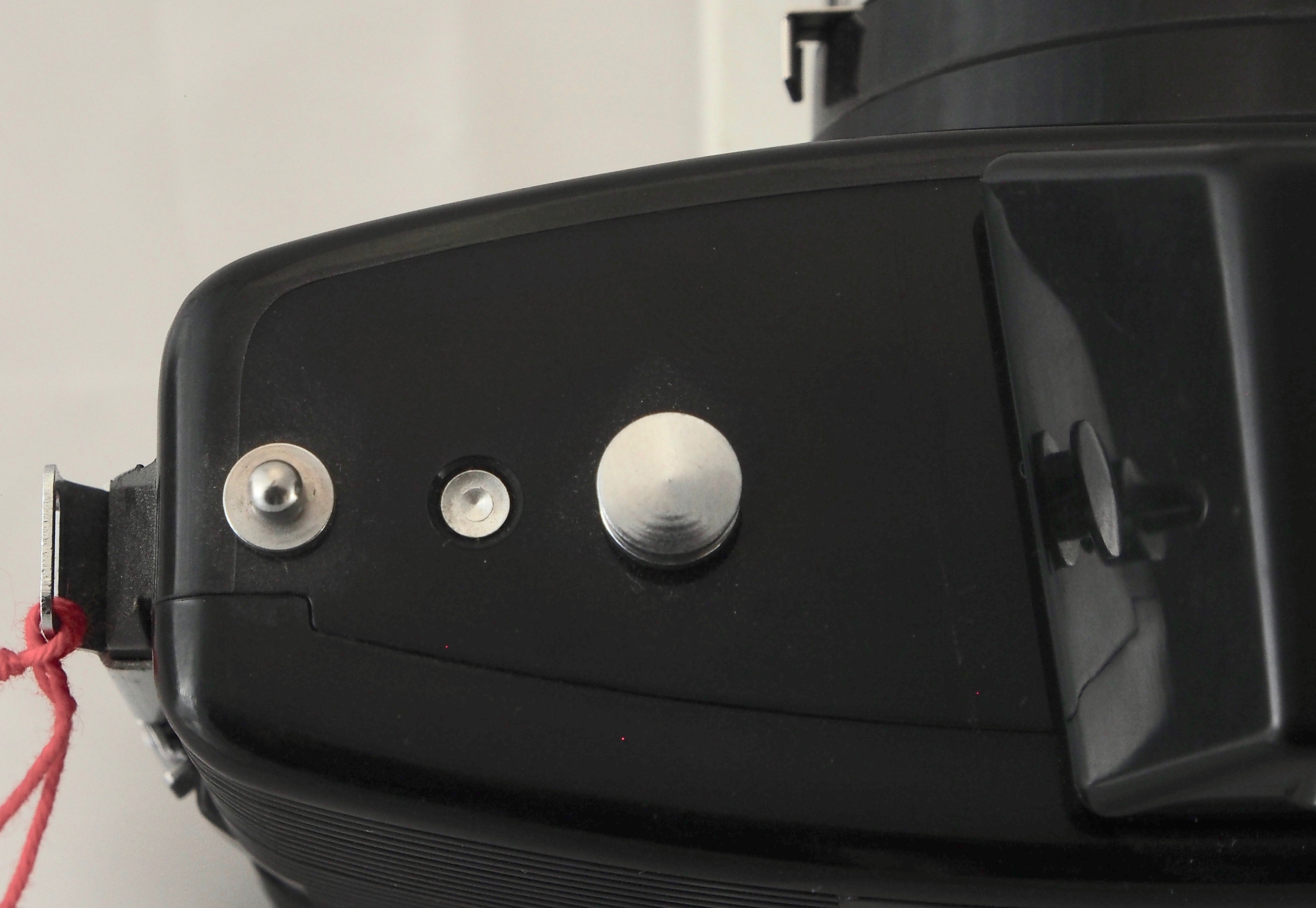 Click Blitzanschluss für Clibofuß